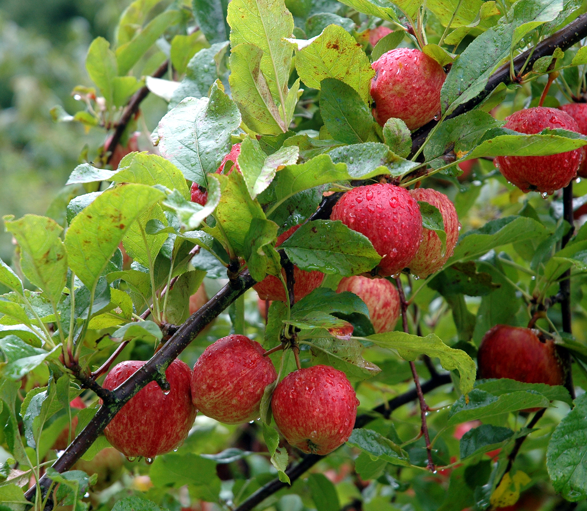 Äpfel in der Region Calvados, Frankreich